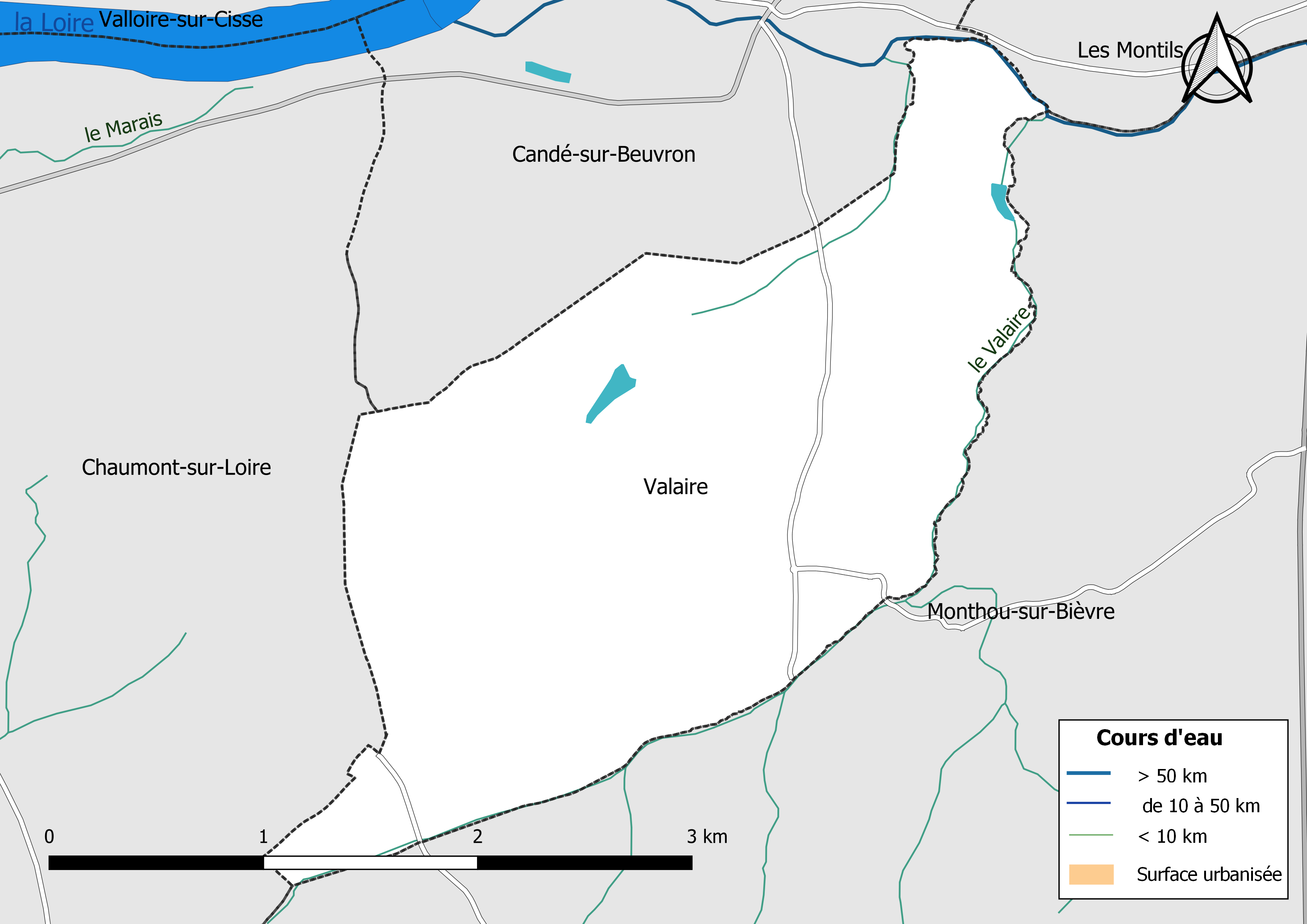 Carte du réseau hydrographique de la commune de Valaire (Loir-et-Cher, France).